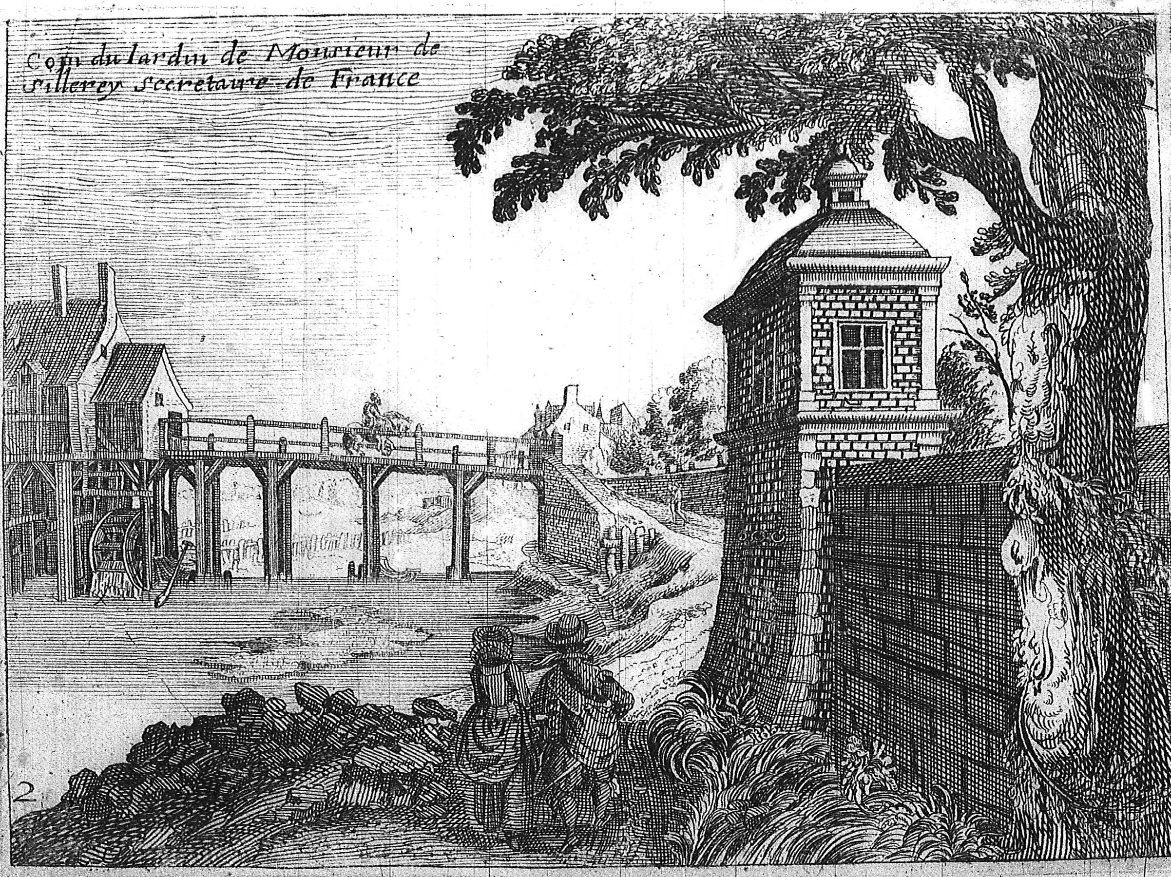 issu de la bibliothèque de reims.